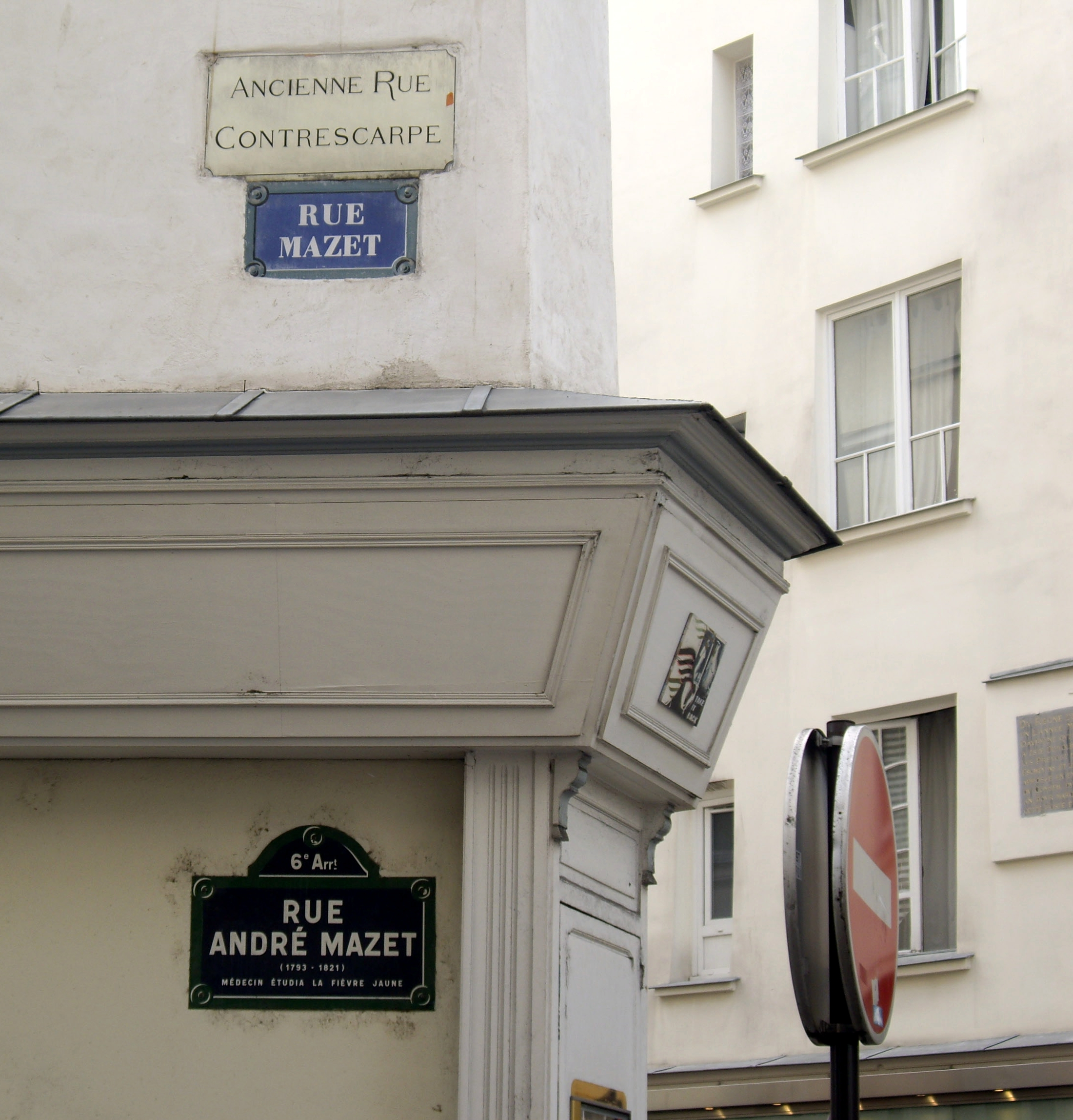 Rue André-Mazet, Paris 6e. Anciens noms : Allée des Murs, ruelle des Murs, rue de la Basoche, rue de la Contrescarpe-Saint-André, rue Mazet.